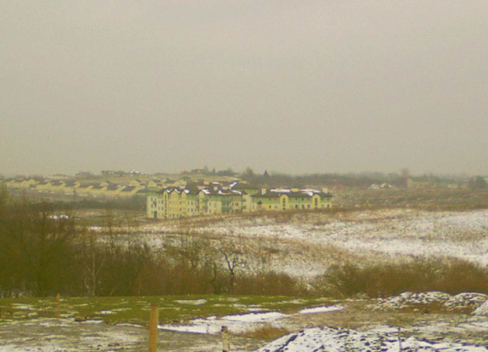 Settlement at Rębowo / osiedle w Rębowie (w tle osiedle w Kowalach).